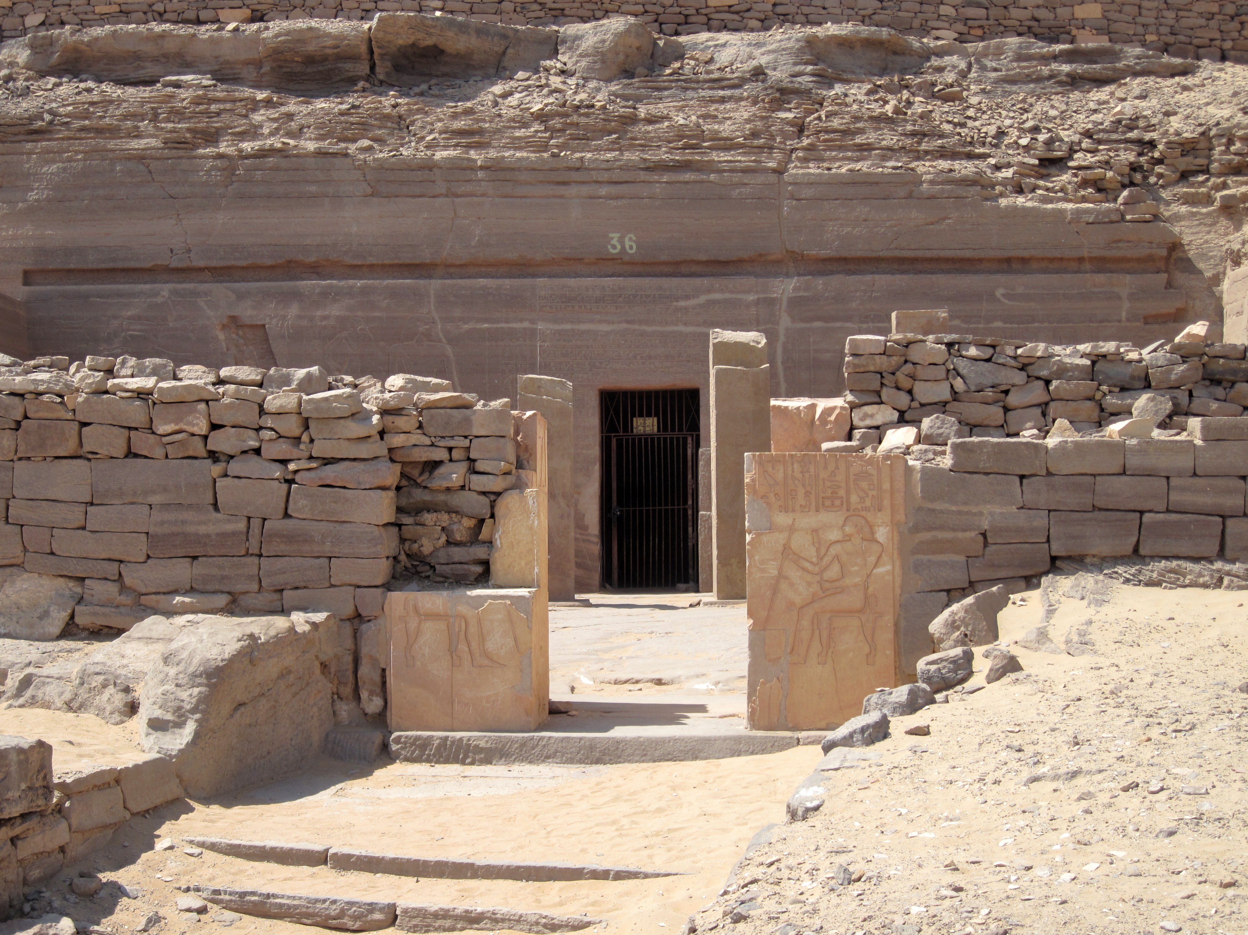 Eingang zum Felsengrab des Sarenput I. auf dem Qubbet el-Hawa bei Assuan, Ägypten